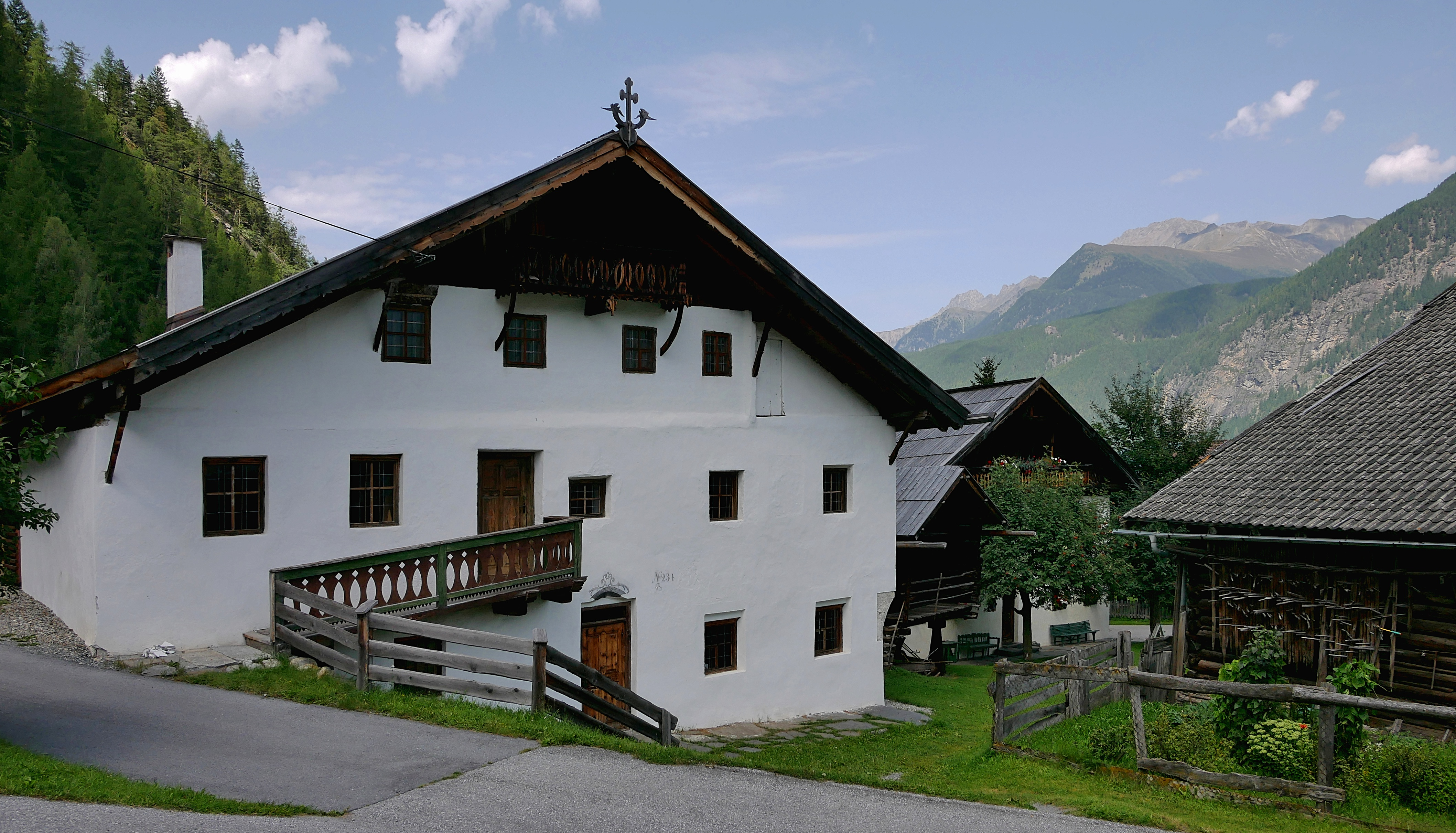 Hofanlage Längenfeld (Ötztal / Tirol) Lehn 23a - Im Sommer 2017 wurde sie gerade für das Ötztaler Freilichtmuseum restauriert.